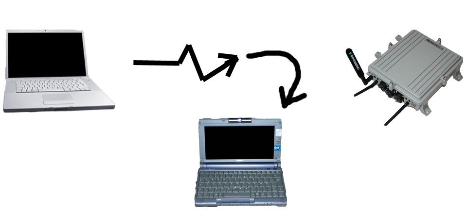 подключение беспроводного клиента к точке-двойнику злоумышленника